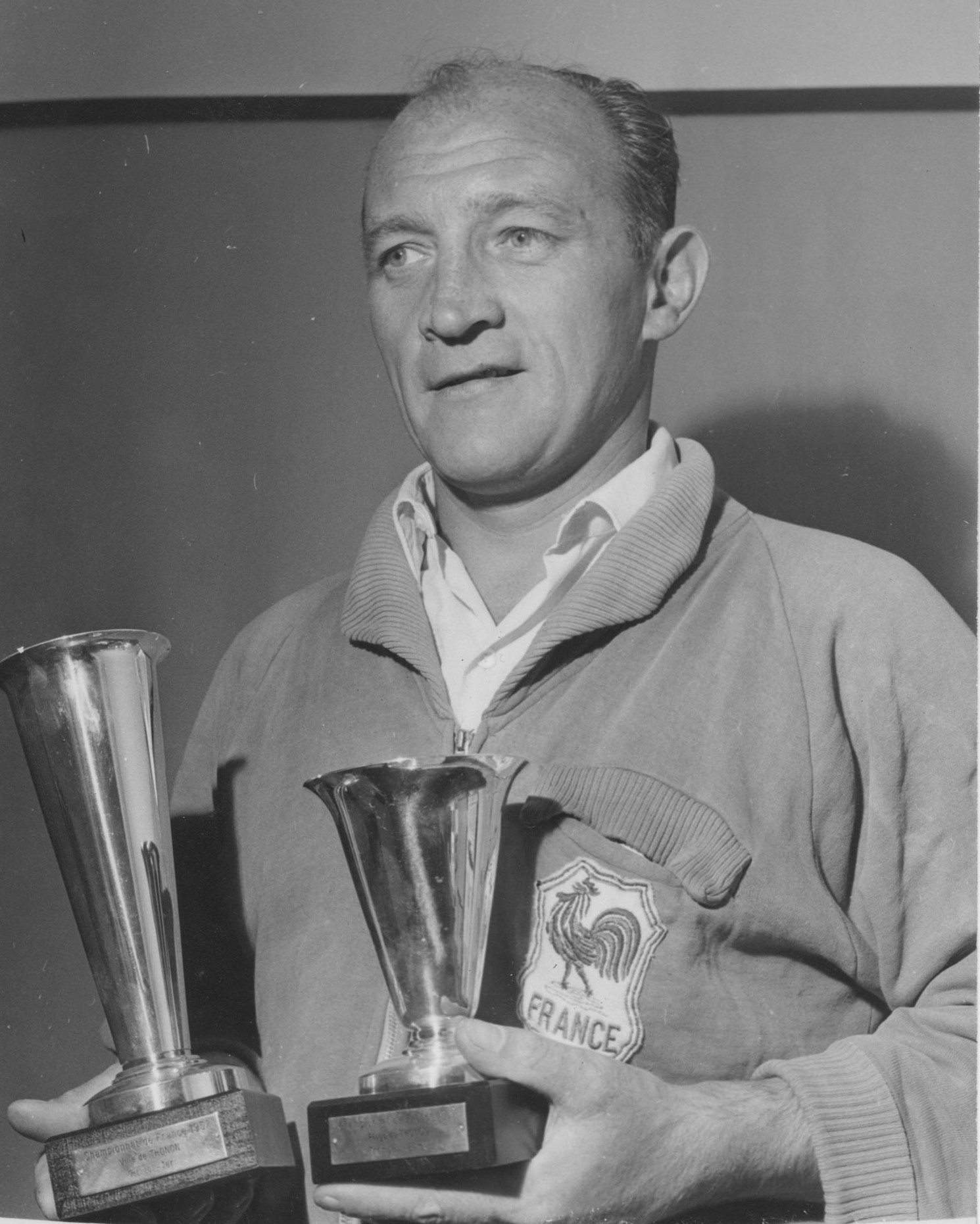 Raymond Mulinghausen brandissant ses deux coupes, l'une de haut vol , l'autre de tremplin .